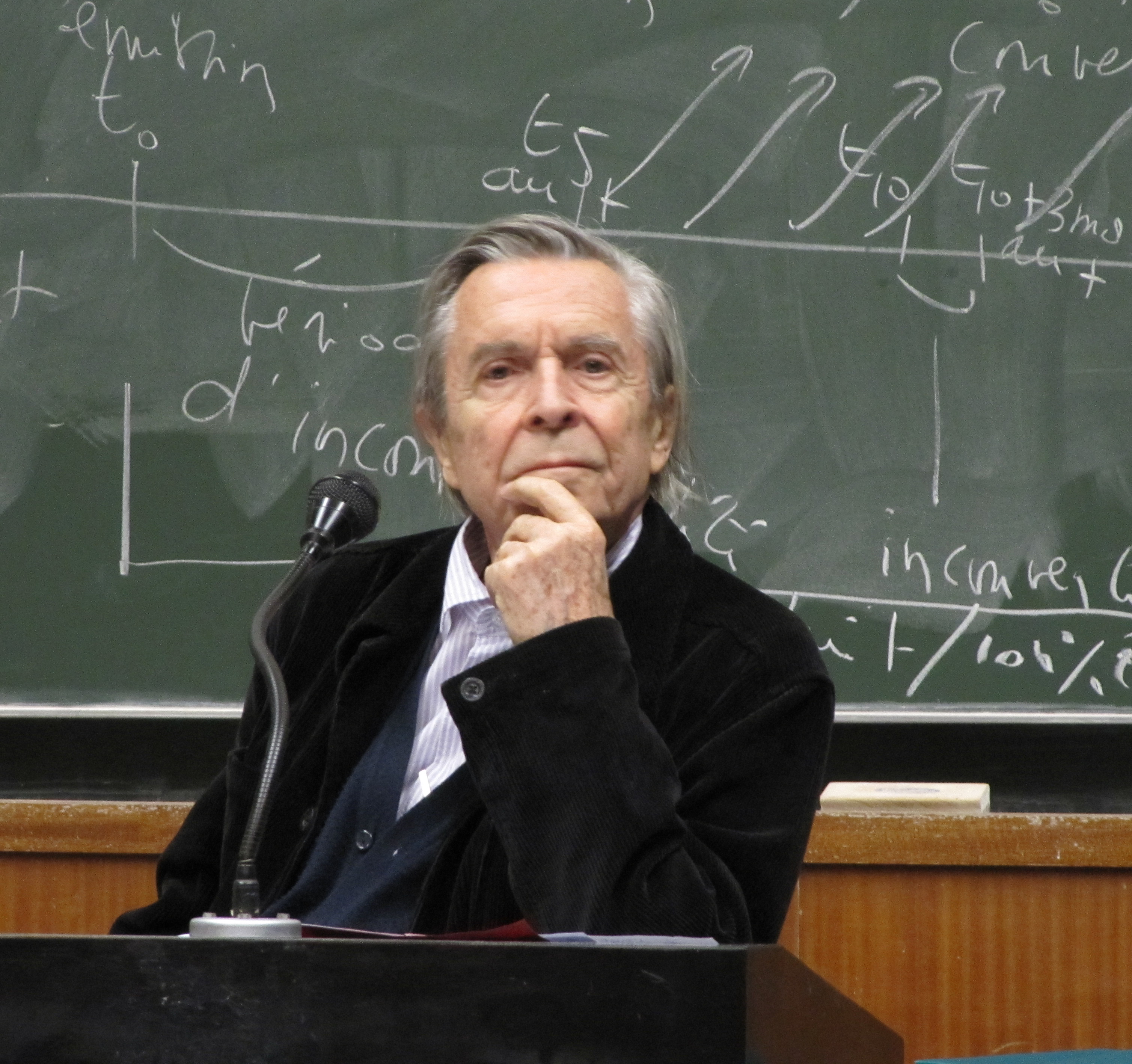 Jean-Pierre Faye lors d'une conférence à l'université de Toulouse 1 Capitole, 24 novembre 2010